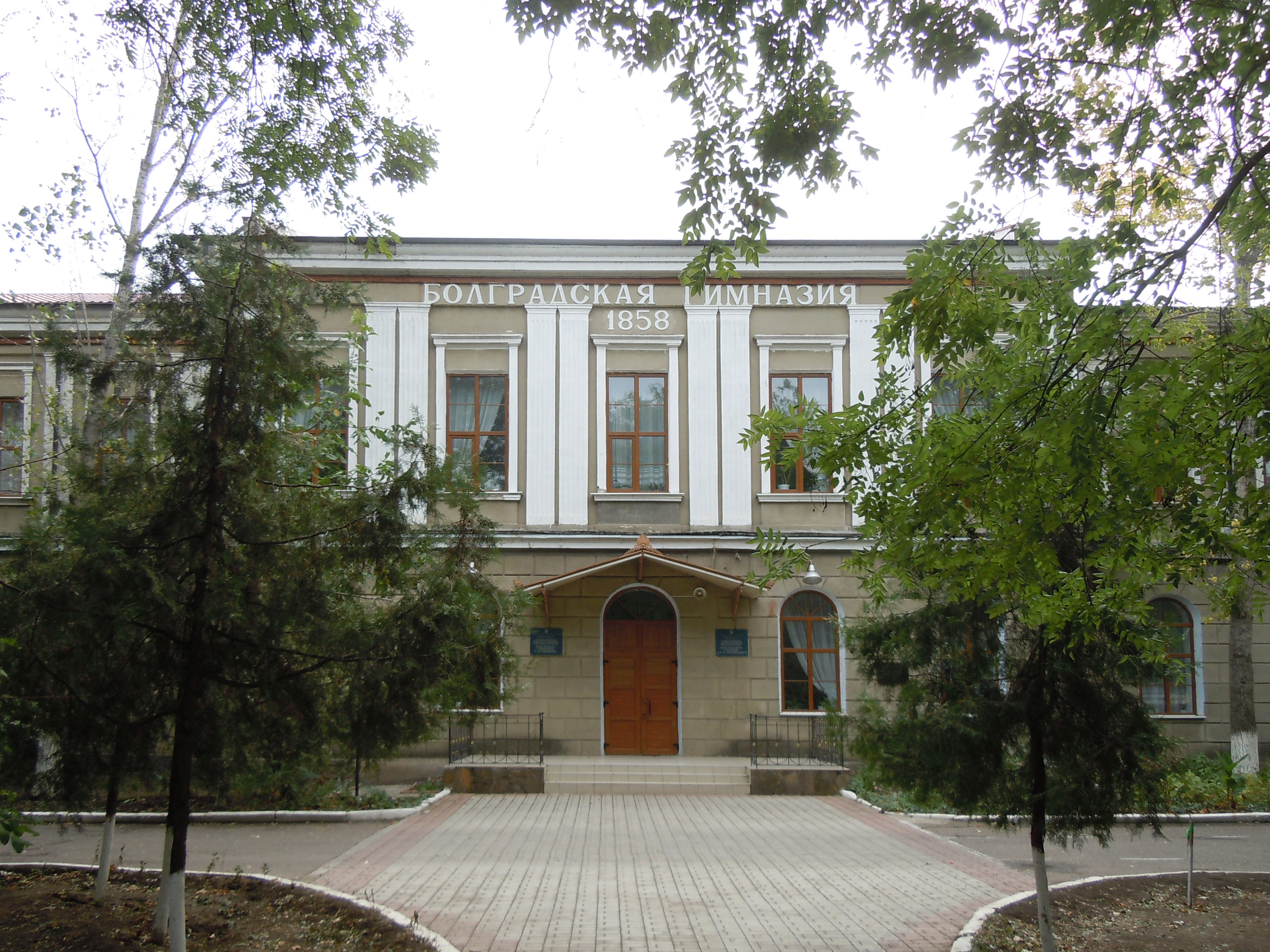 Чоловіча гімназія, Болград, 28 червня пл., 1